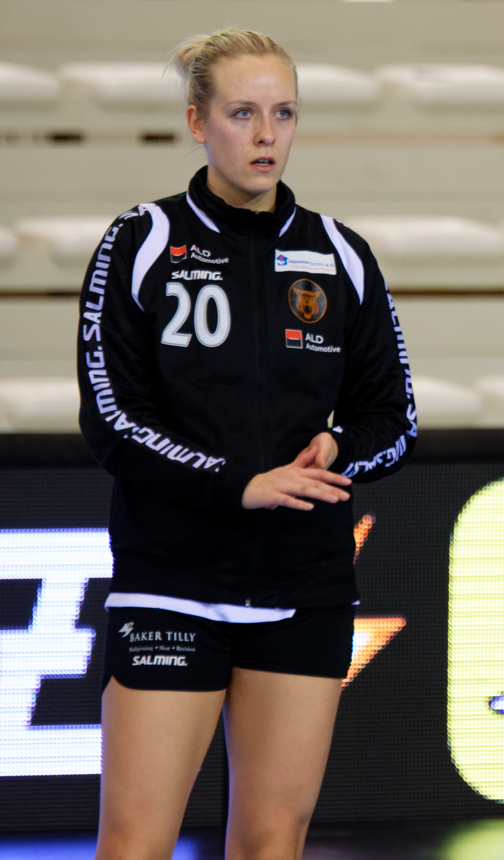 Rencontre du tour principal de la coupe EHF entre Issy Paris Hand et les danoises de Copenhague. A Issy Les Moulineaux, le 28 janvier 2018.